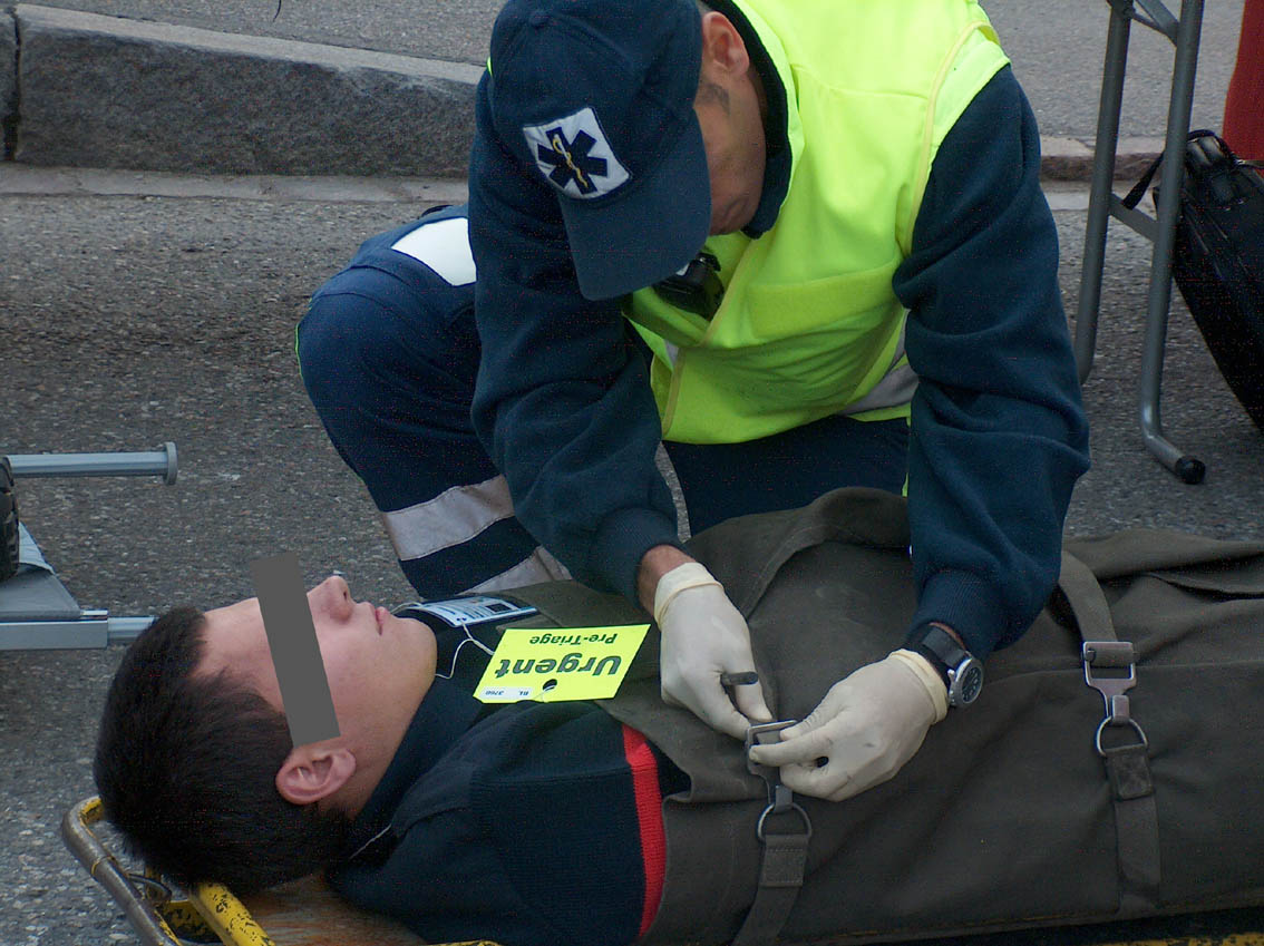 Triage durch Sanitäter an Figurant anlässlich der Hauptübung "Senza Limiti" der Stützpunktfeuerwehren Liestal und Sissach, der Feuerwehr Lausen, der Betriebswehr der SBB, der Chemiewehr und des Katastrophenschutzes, in Lausen, Höhe alter Bahnhof/Güterterminal. Gut erkennbar: Prioritätskarte.